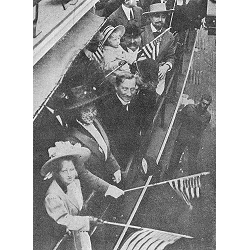 Cook insieme alla moglie Marie di ritorno in America